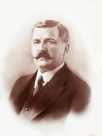 Foto de Venceslau Brás da Presidência da República Federativa do Brasil.